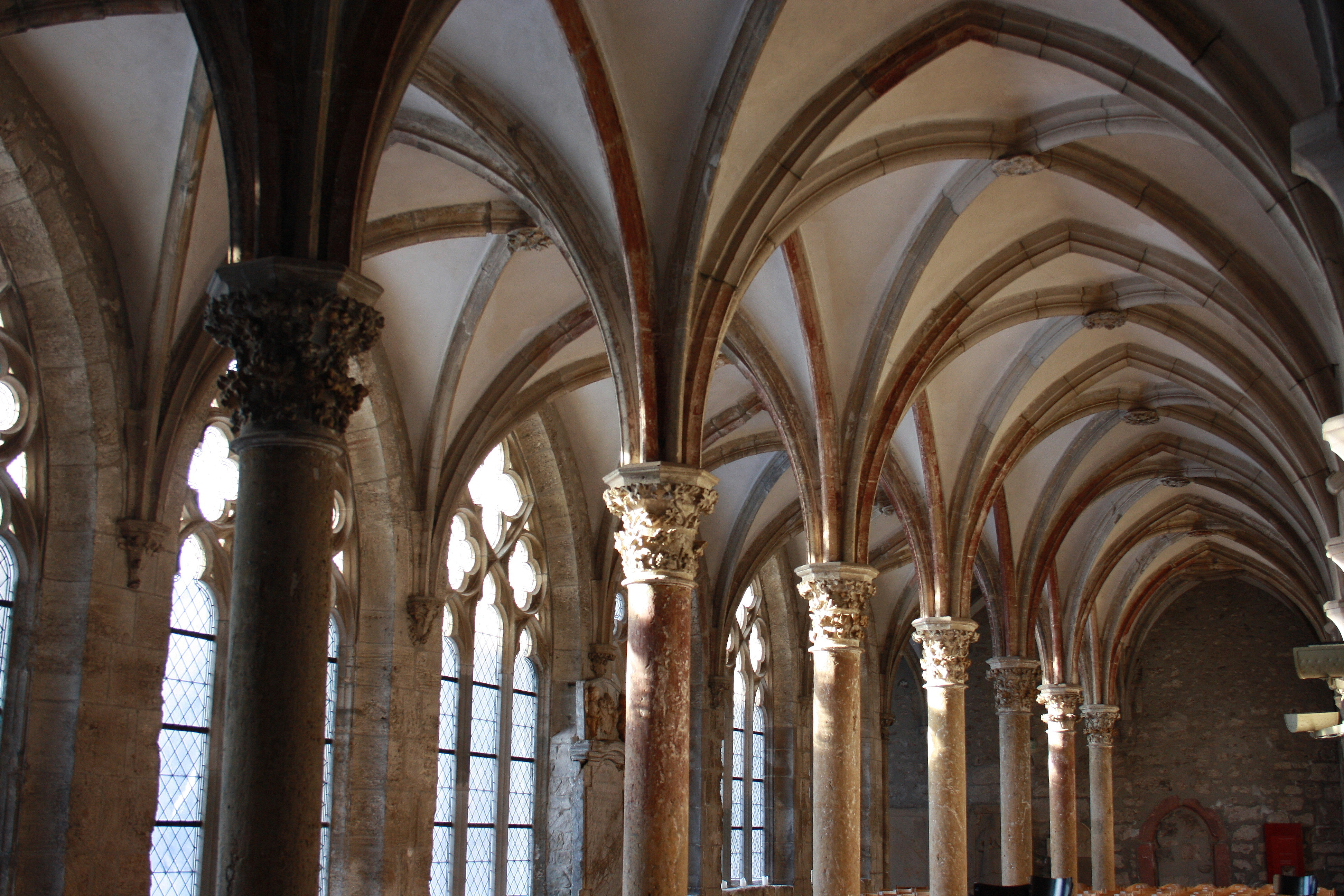 Zisterzienser Kloster Walkenried - südl. Harz Lesesaal - heute Konzertsaal